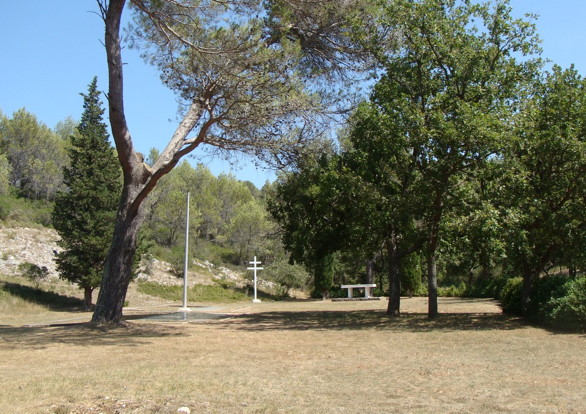 Vue d'ensemble du site du charnier de Signes (Var).